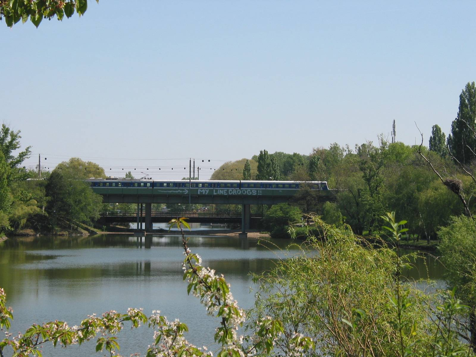 de: S-Bahn-Brücke im Wasserpark in Wien en: S-Bahn- bridge in Wasserpark, Vienna